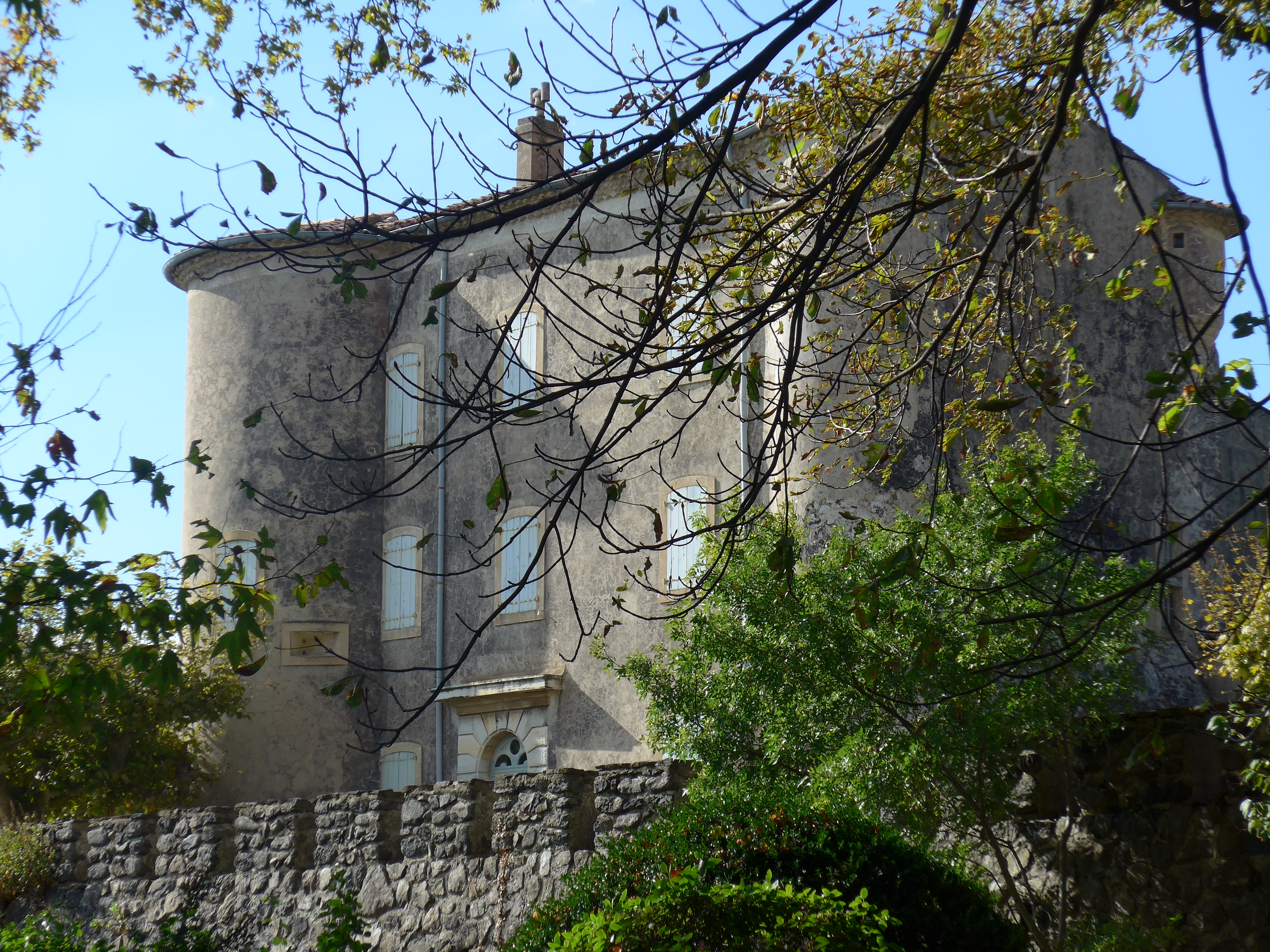 Saint-Martin-sur-Lavezon (Ardèche, France), le château de Pampelonne (propriété privée, ne se visitant pas).